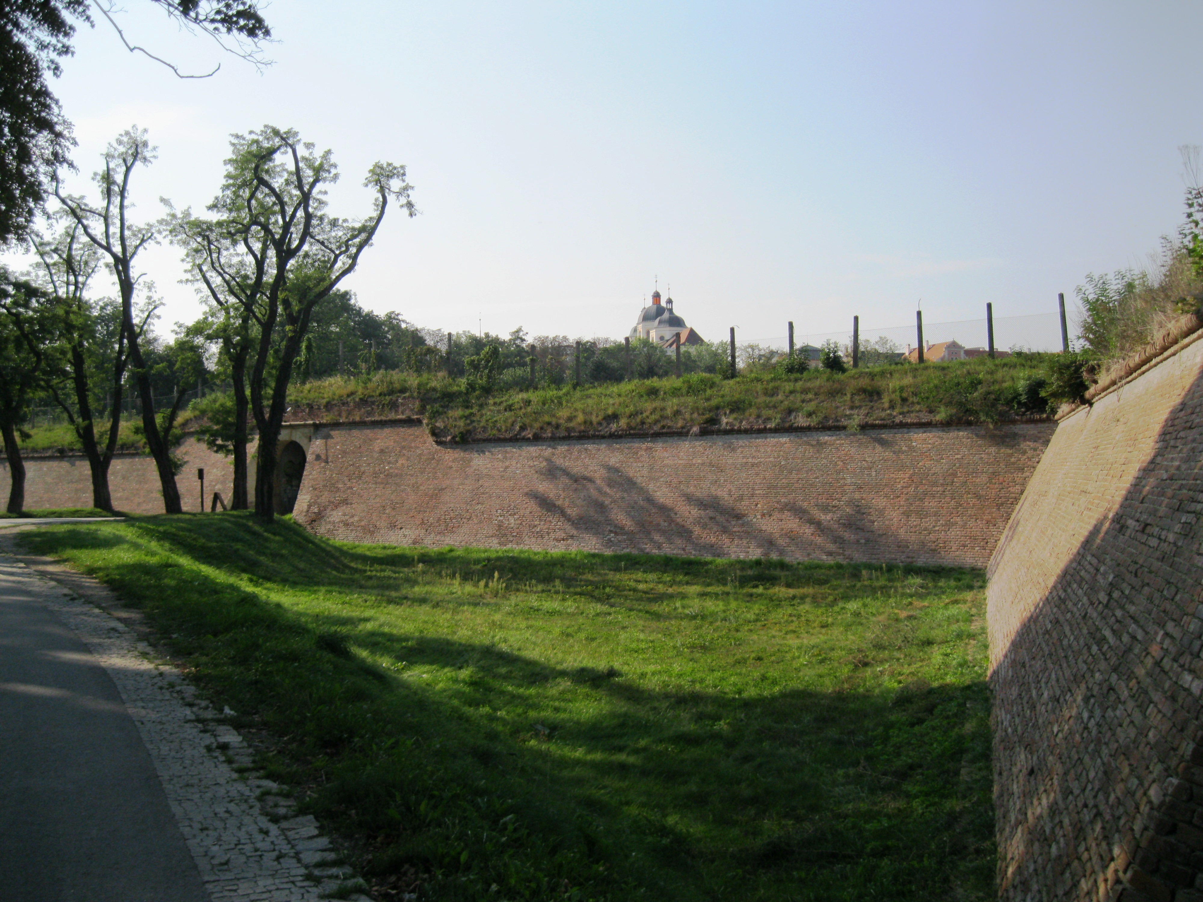 Pevnost Korunní, Bezručovy sady, Olomouc